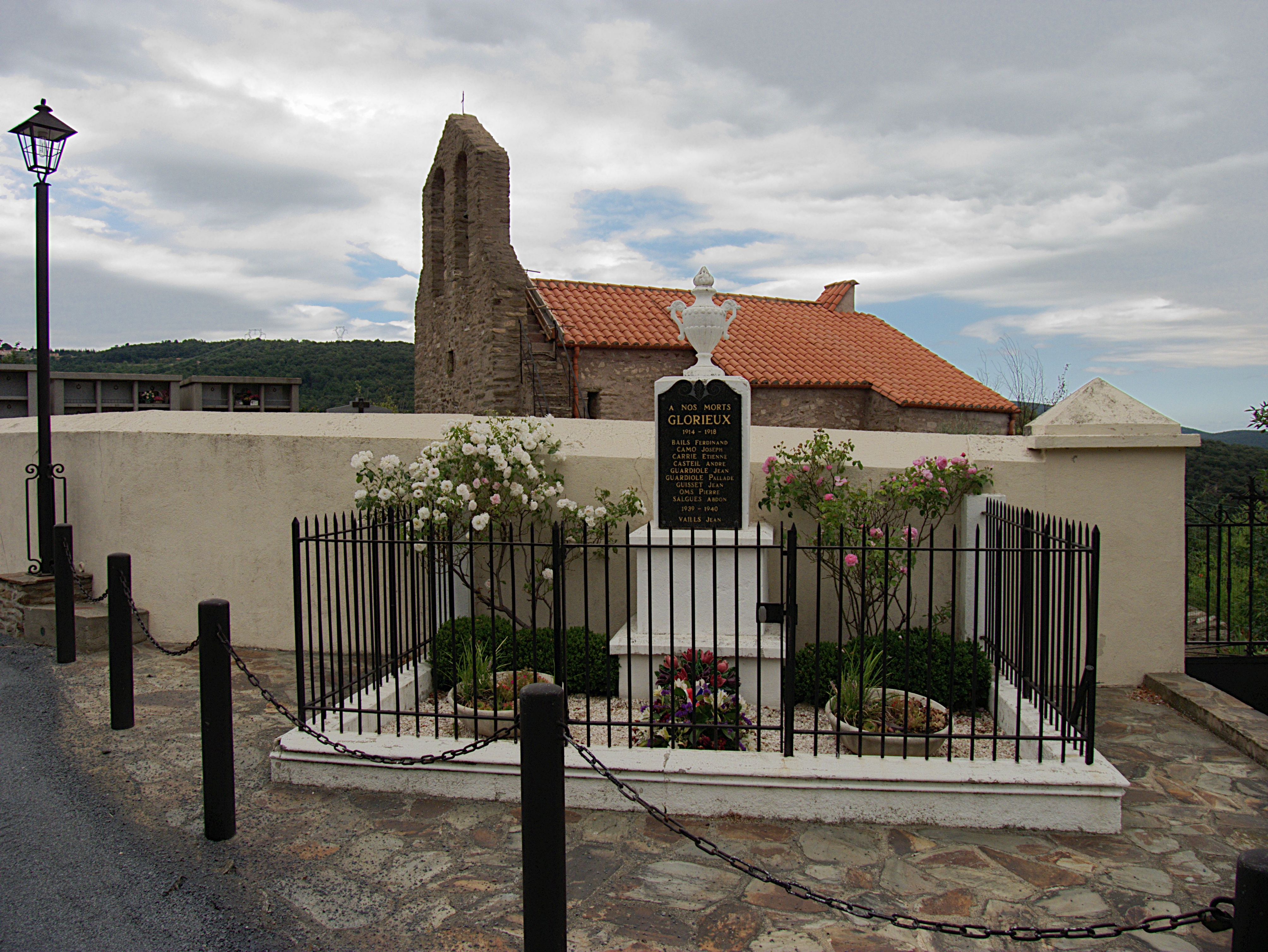 Monument aux morts, Taulis (Pyrénées-Orientales, Languedoc-Roussillon, France)